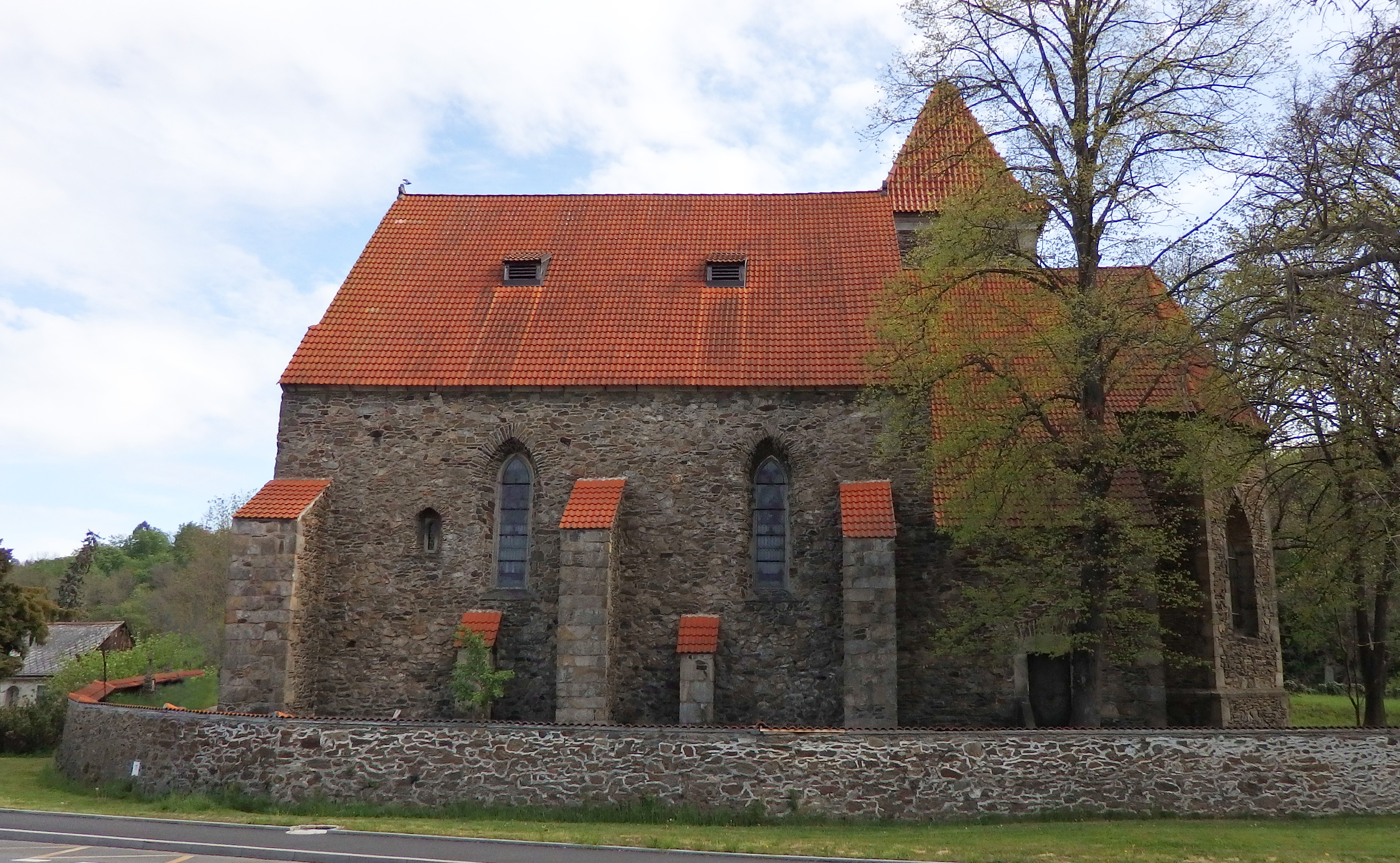 Pohled jižní